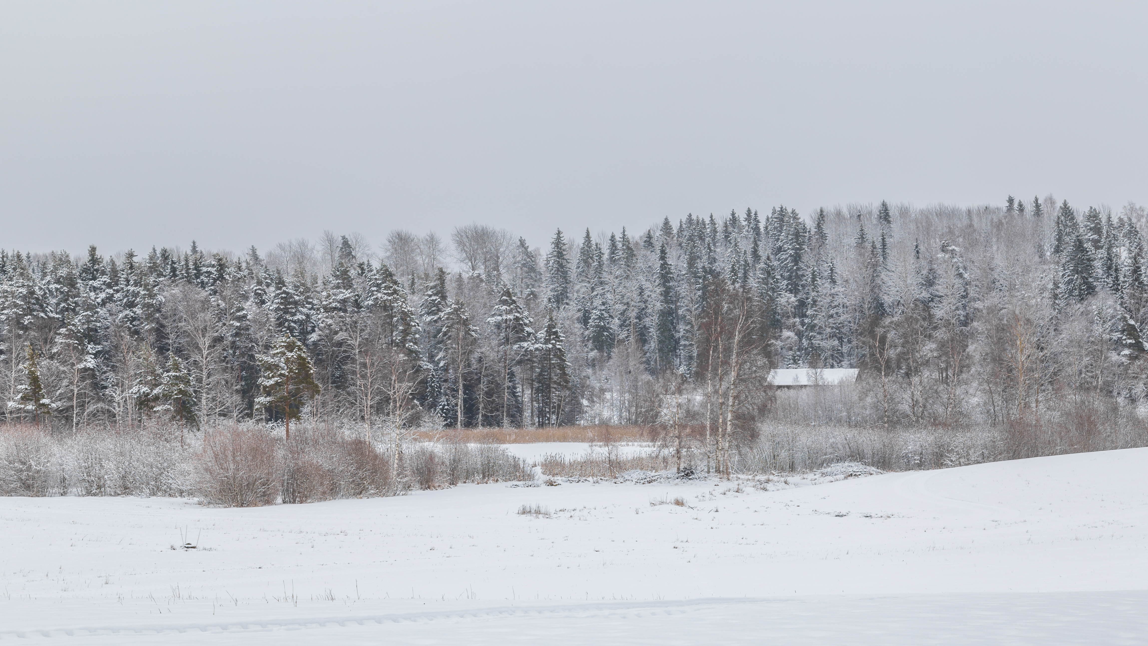 Stutsjön, Sala kommun, Västmanlands län, Sverige